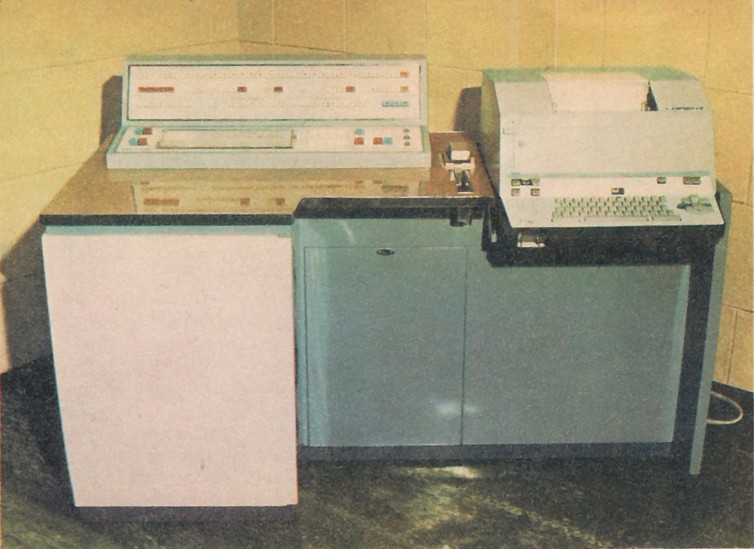 Komputer GEO 2